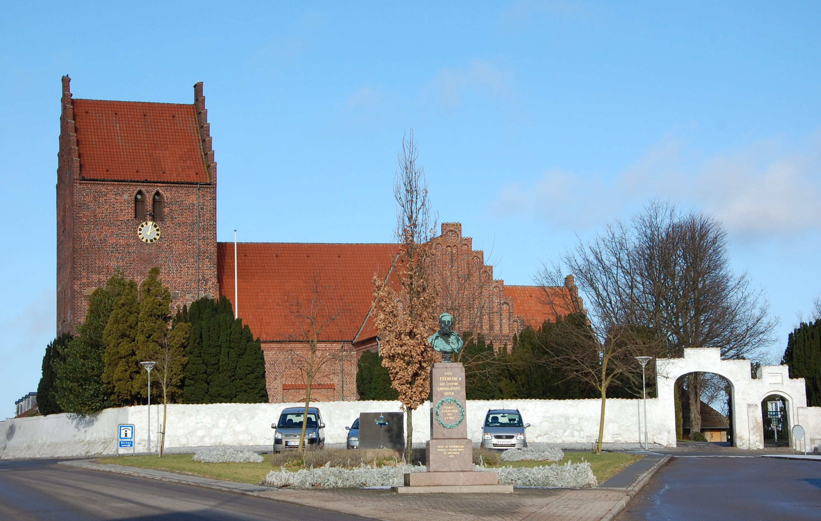 Kirche von Nyköbing